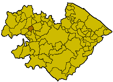 Lage von Pietrarubbia in der italienischen Provinz Pesaro-Urbino